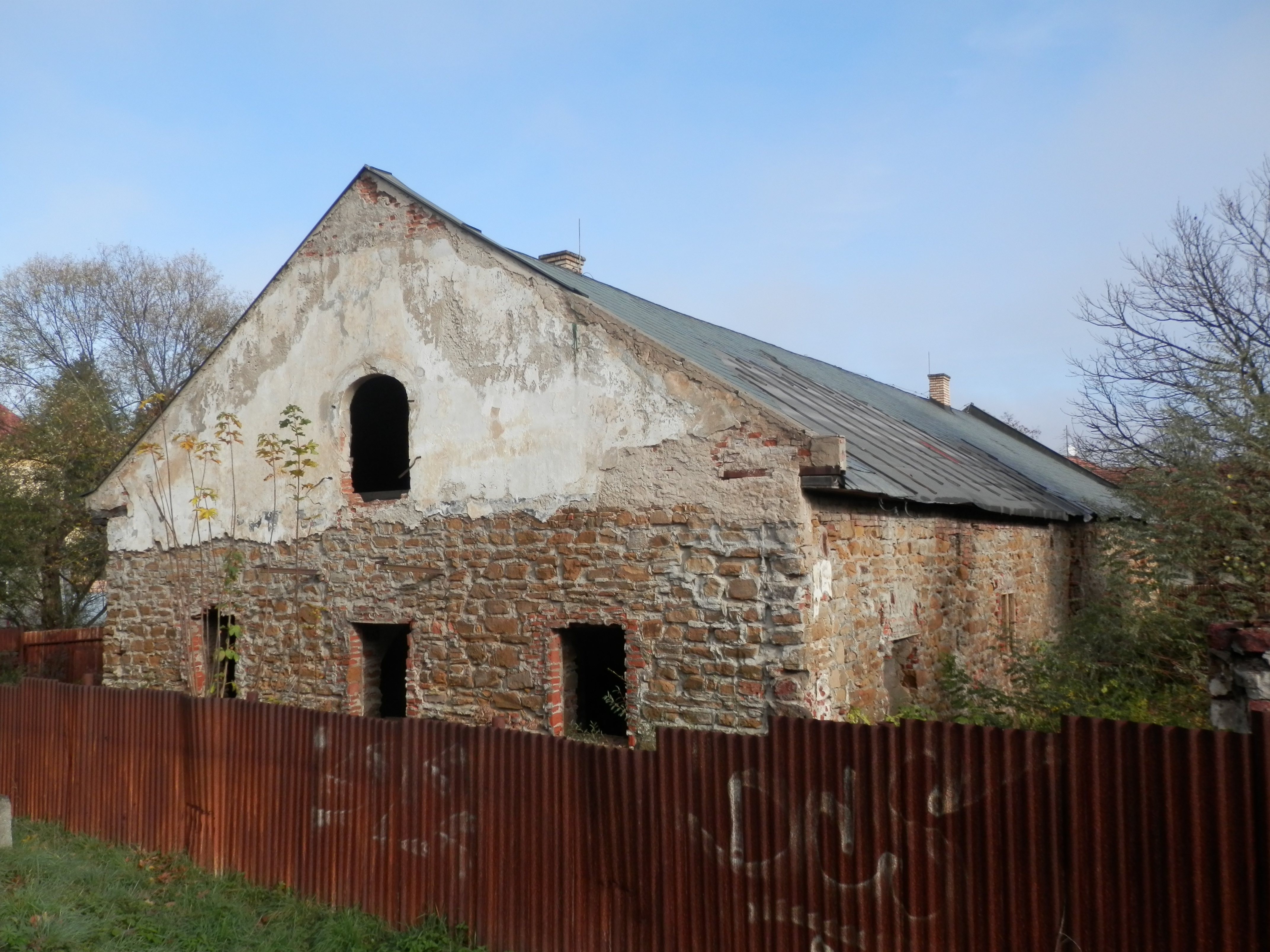 Solivar ulica Padlých hrdinov 2. Mesto Prešov. Národná kultúrna pamiatka - vozovňa